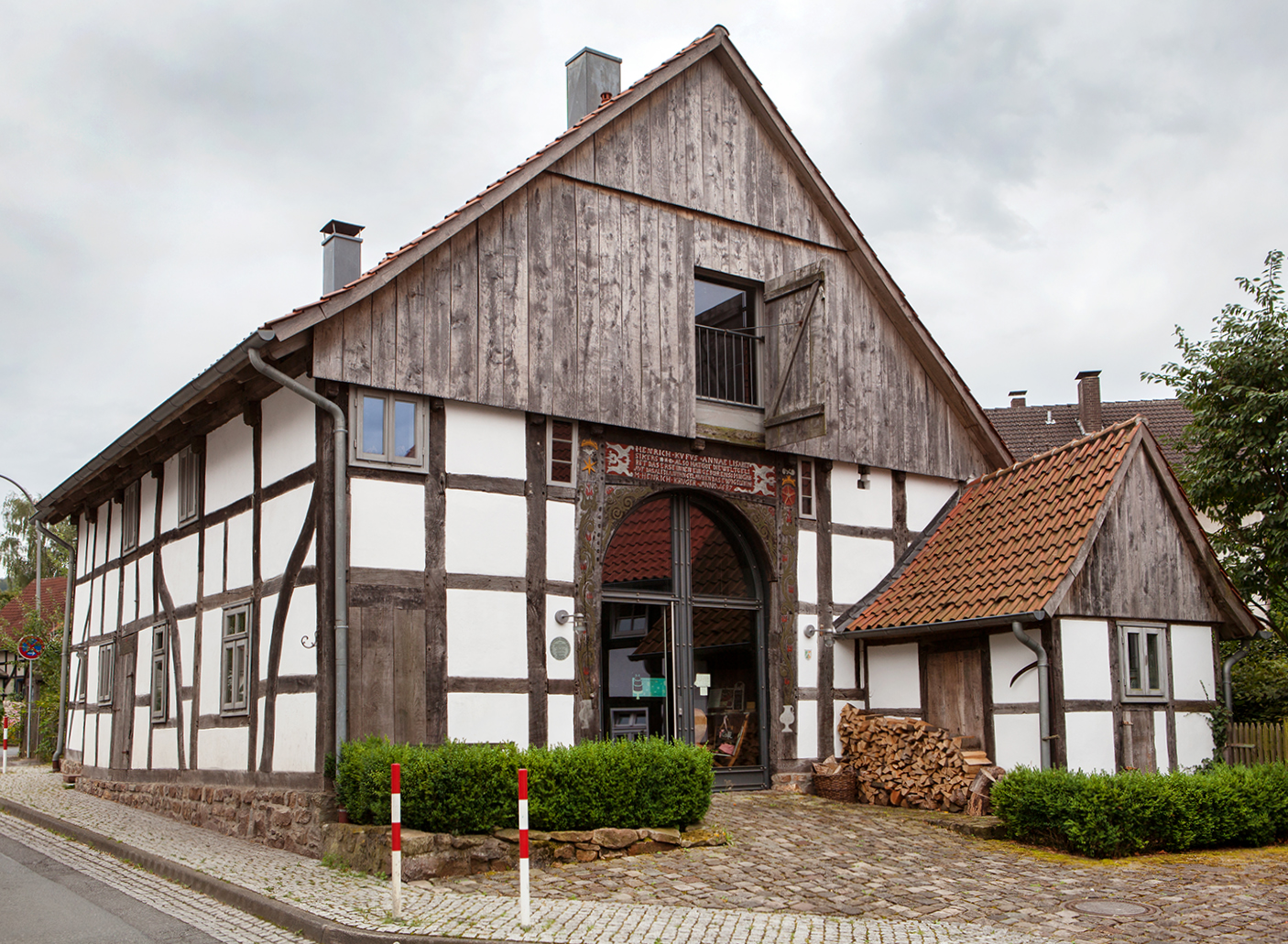 Kötterhaus mit Mikwe, Lüdenhausen, Kalletal This is the photograph of an architectural monument. It is part of the list of cultural monuments of Kalletal, no. 54